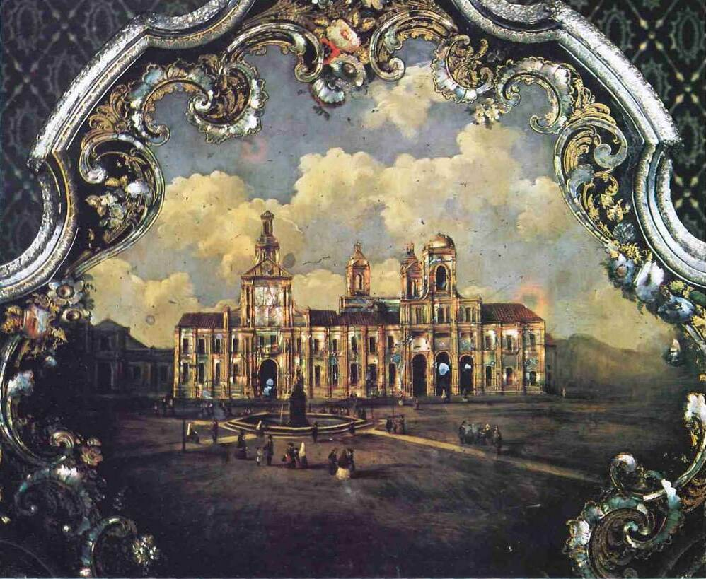 Primera Sesión Ordinaria del Congreso Nacional realizada en el Palacio de la Real Audiencia de Santiago.